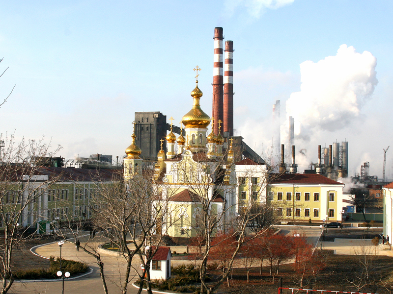 Свято-Варваринский храм в Макеевке, территория Ясиновского коксохимического завода